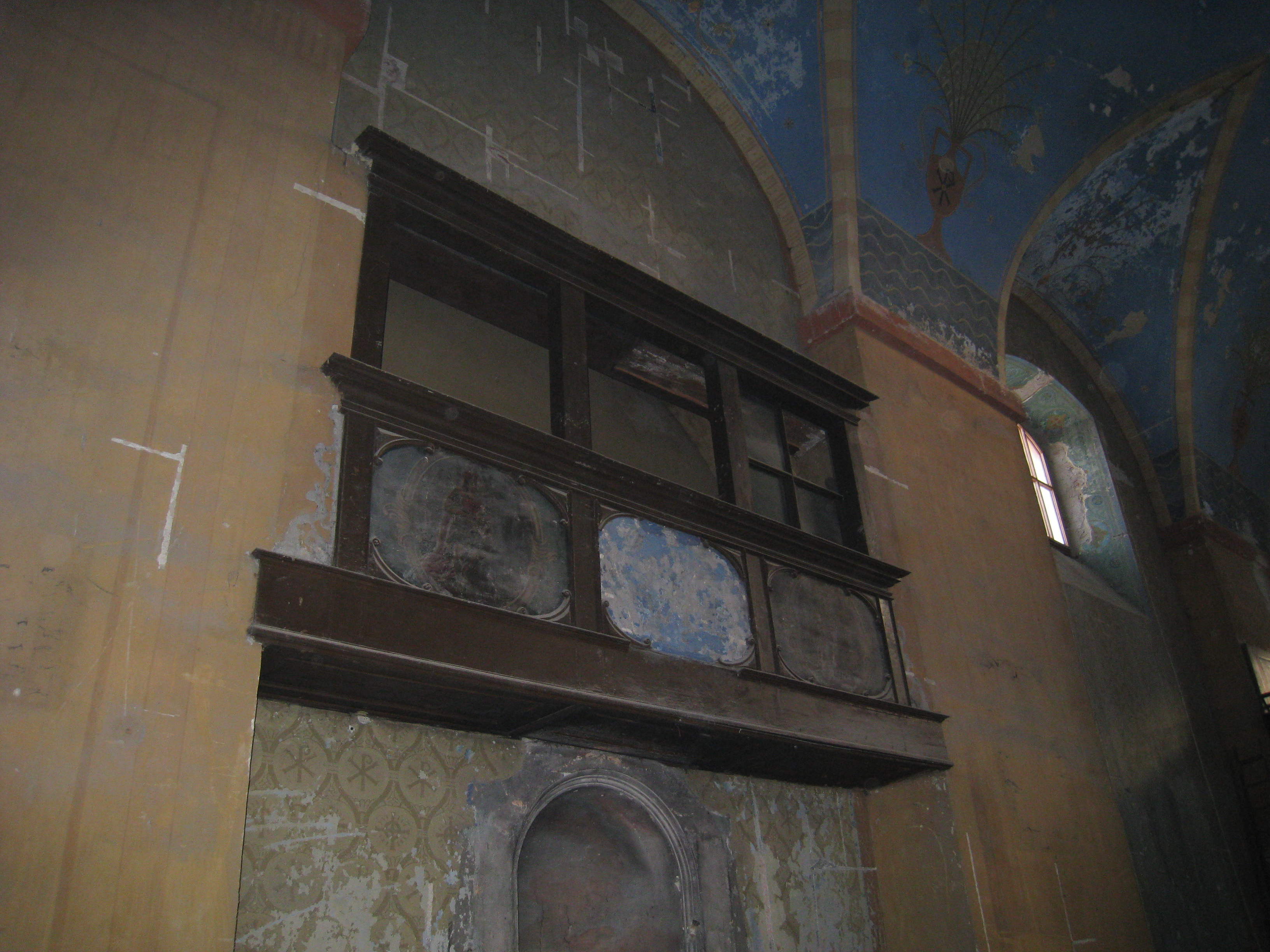 Pohled na dřevěnou oratoř v hlavní lodi kostela sv. Josefa v Chrudimi, nyní Muzea barokních soch, před zahájením rekonstrukce v letech 2009-2010. Dle původního návrhu mělo dojít k jejímu deponování, což se naštěstí nestalo.